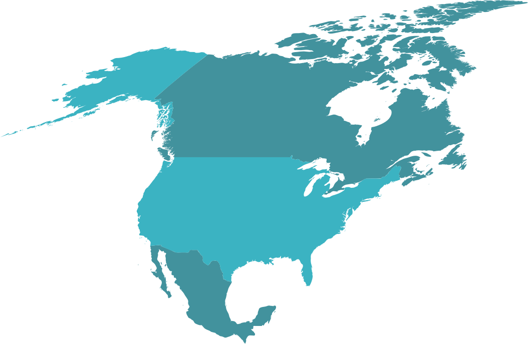 North America Union.